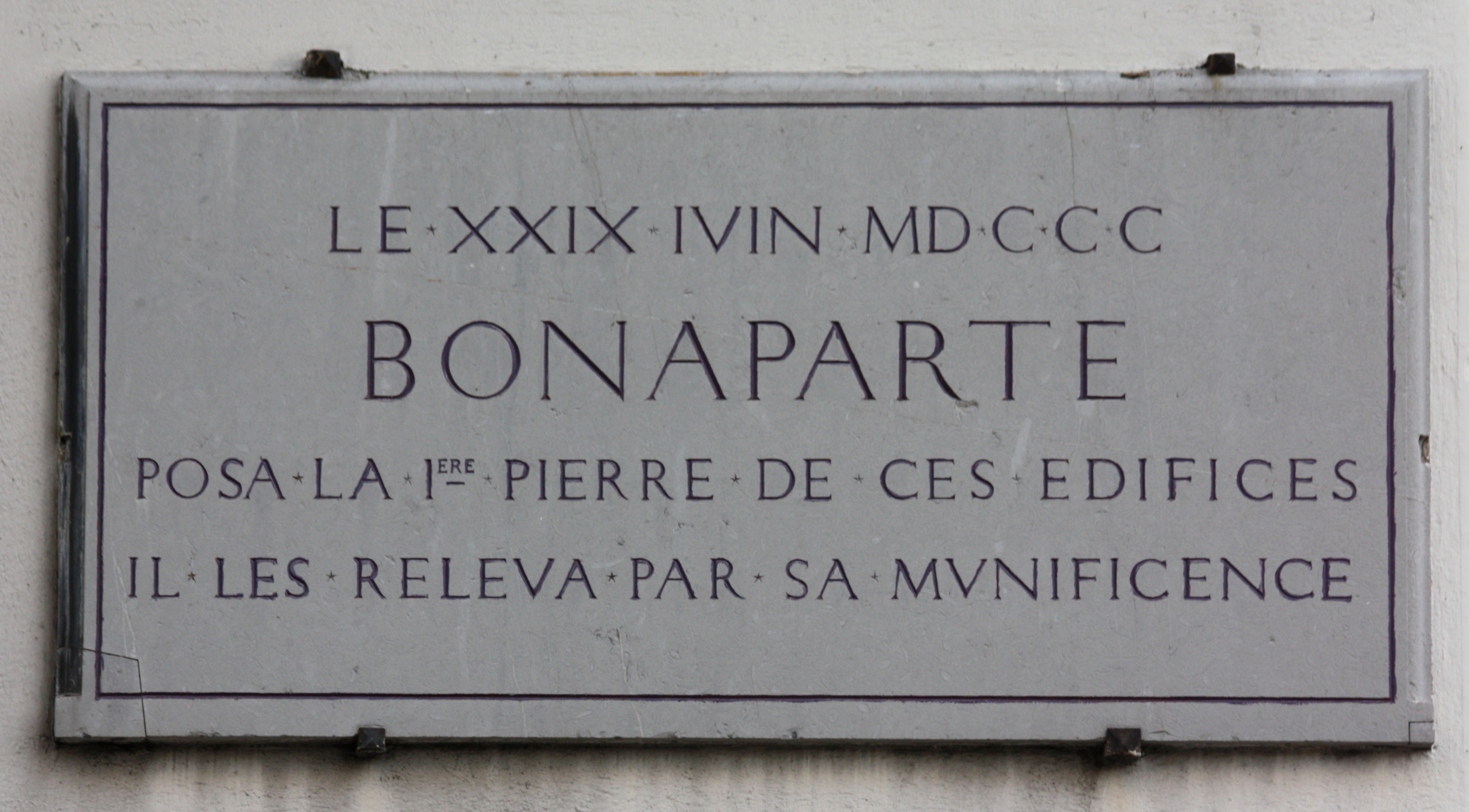 Plaque située Rue du Colonel Chambonnet à Lyon. Il est écrit : « Le XXIX IVIN MDCCC BONAPARTE posa la 1ère pierre de ces édifices et les releva par sa munificence »